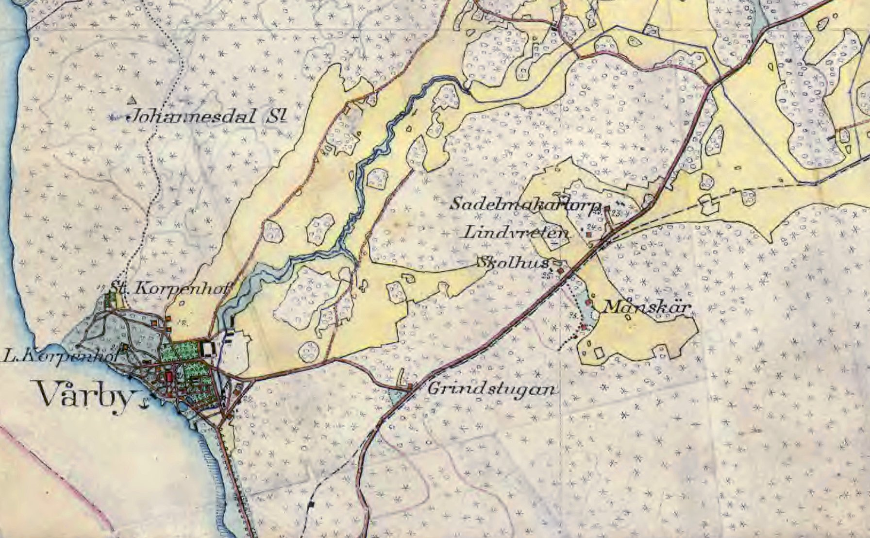 Vårby i Huddinge, Härardskartan 1901